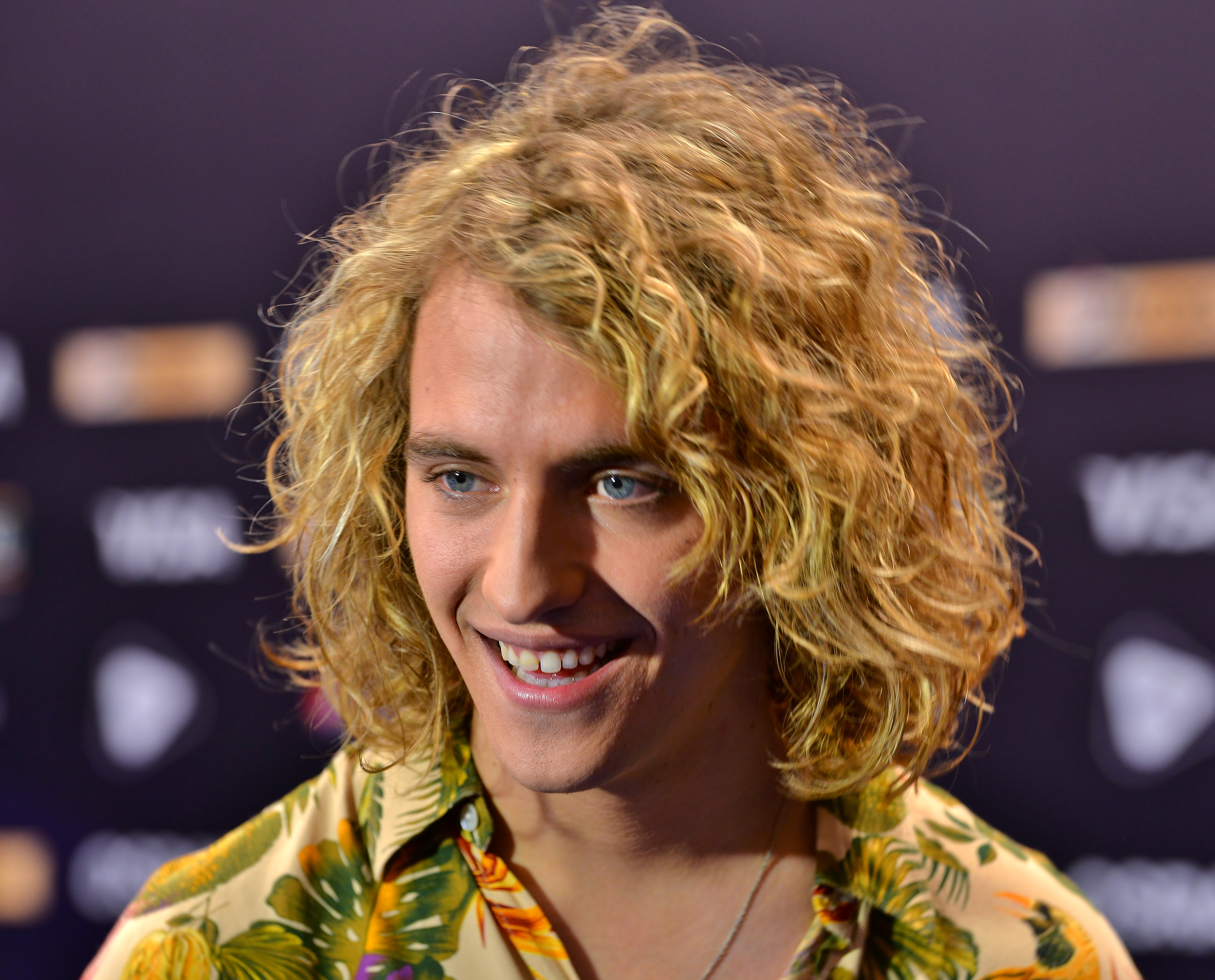 Іспанський співак і гітарист Манель Наварро на пісенному конкурсі Євробачення 2017 у Києві